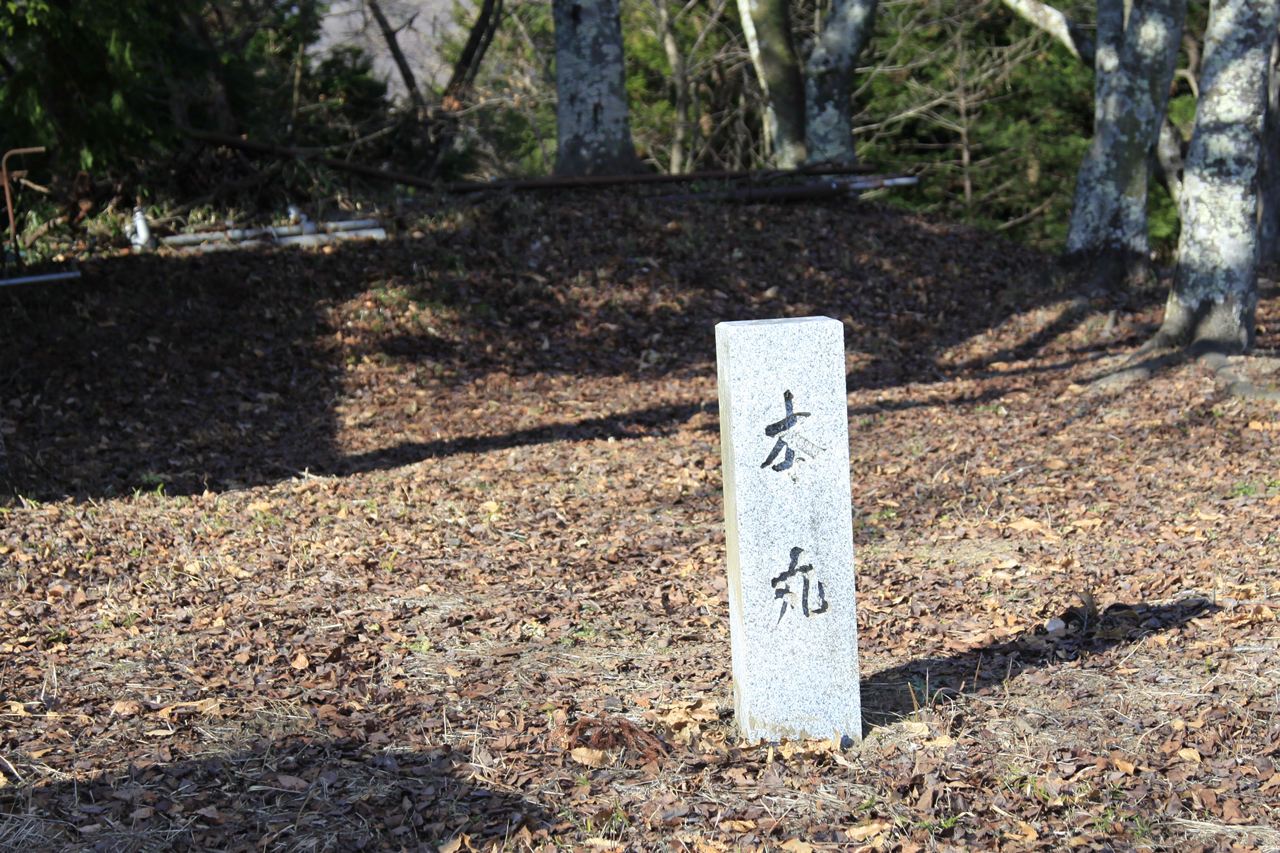 勝山城 (甲斐国都留郡)